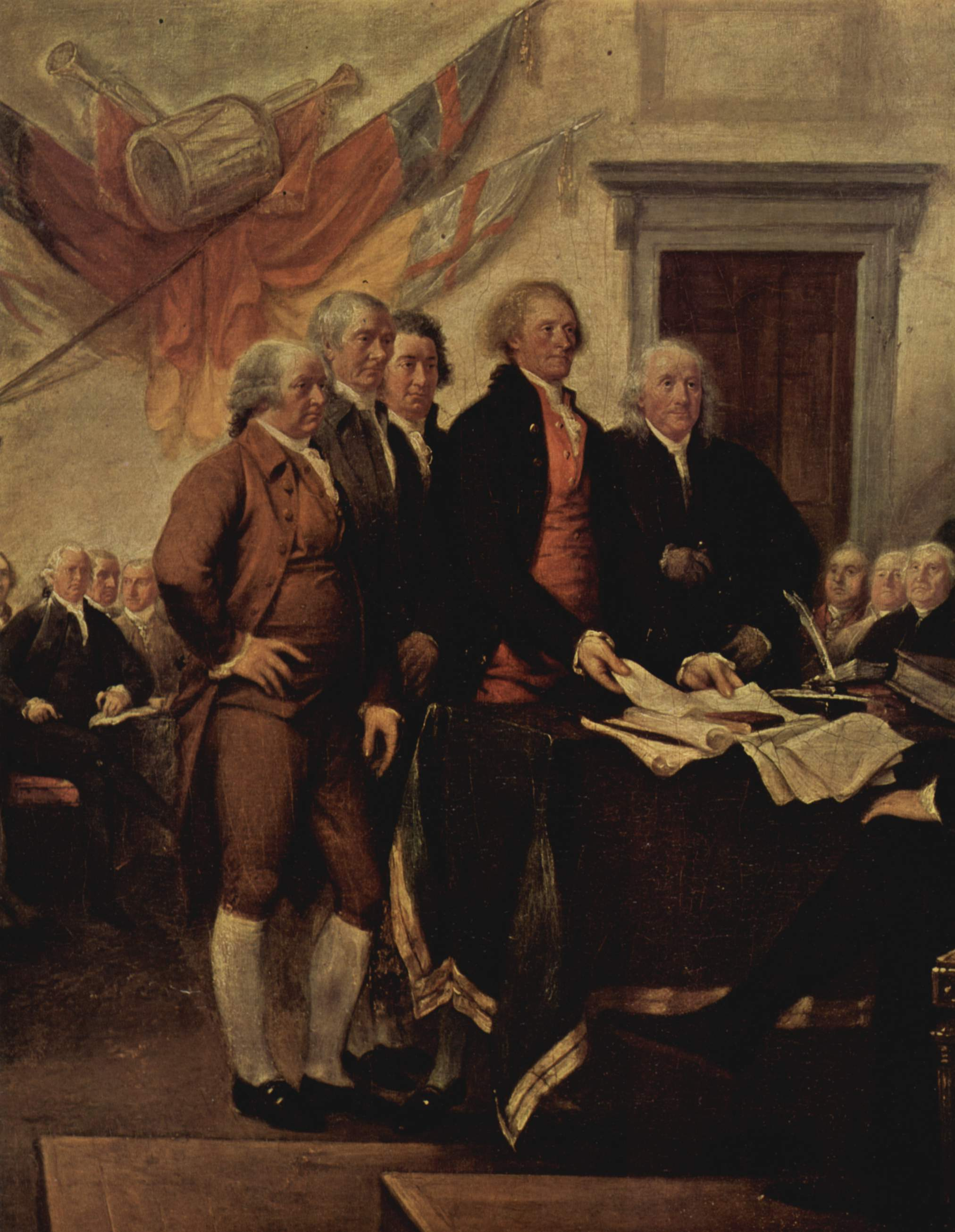 detail